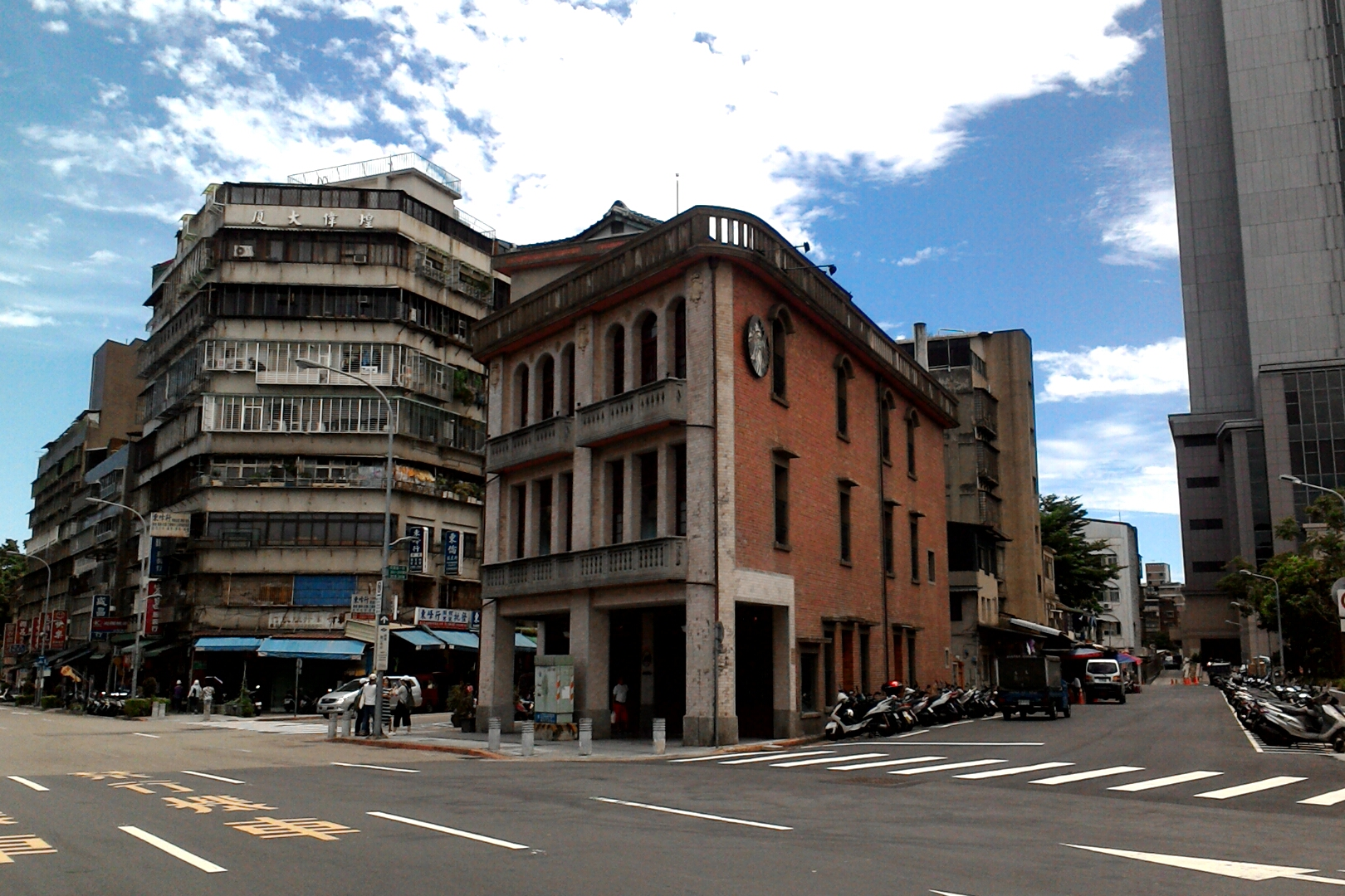 西園路旁的萬華林宅,台北市萬華區龍山次分區富福里